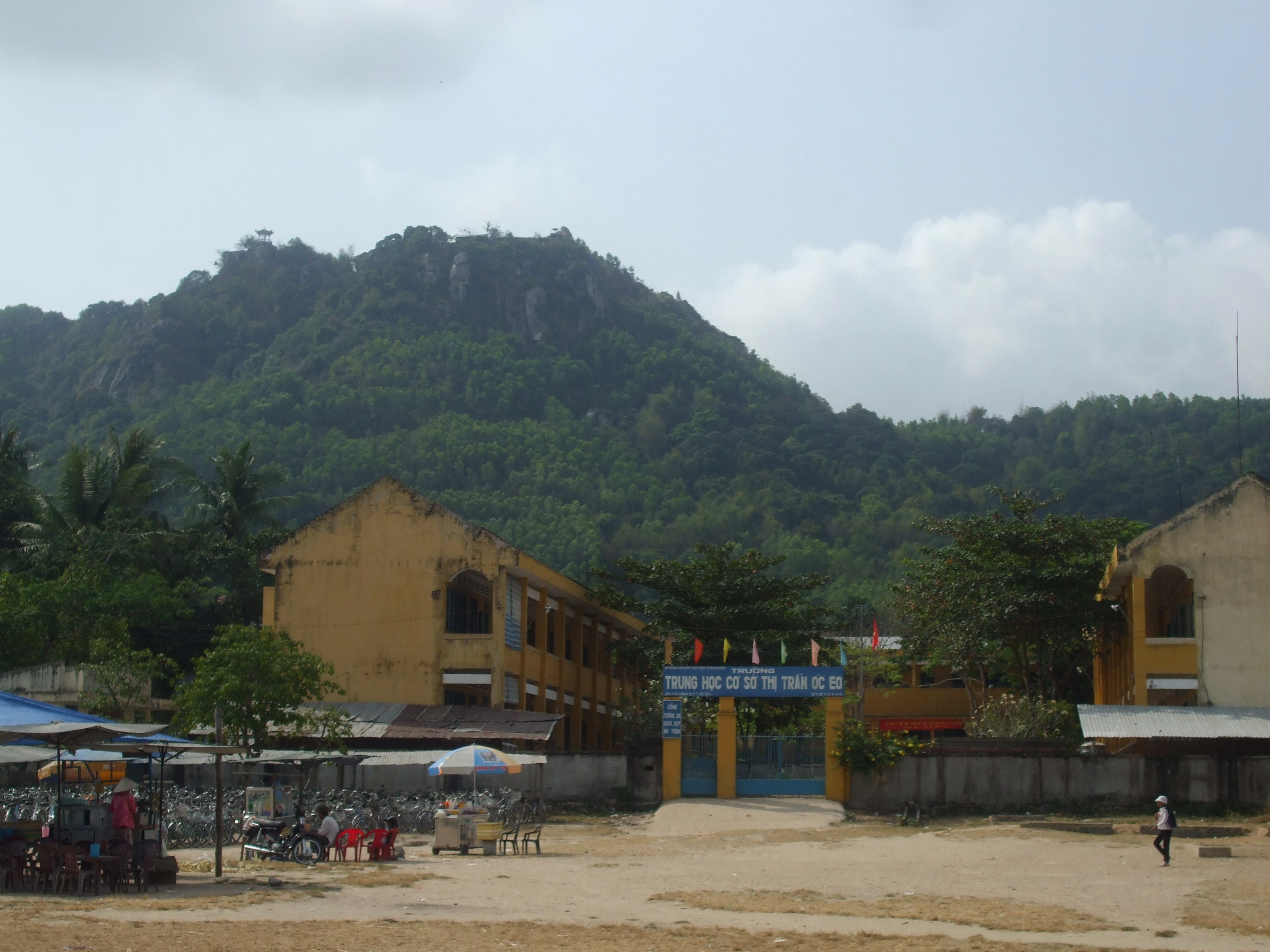 Núi Ba Thê, thị trấn Óc Eo, huyện Thoại Sơn, An Giang.